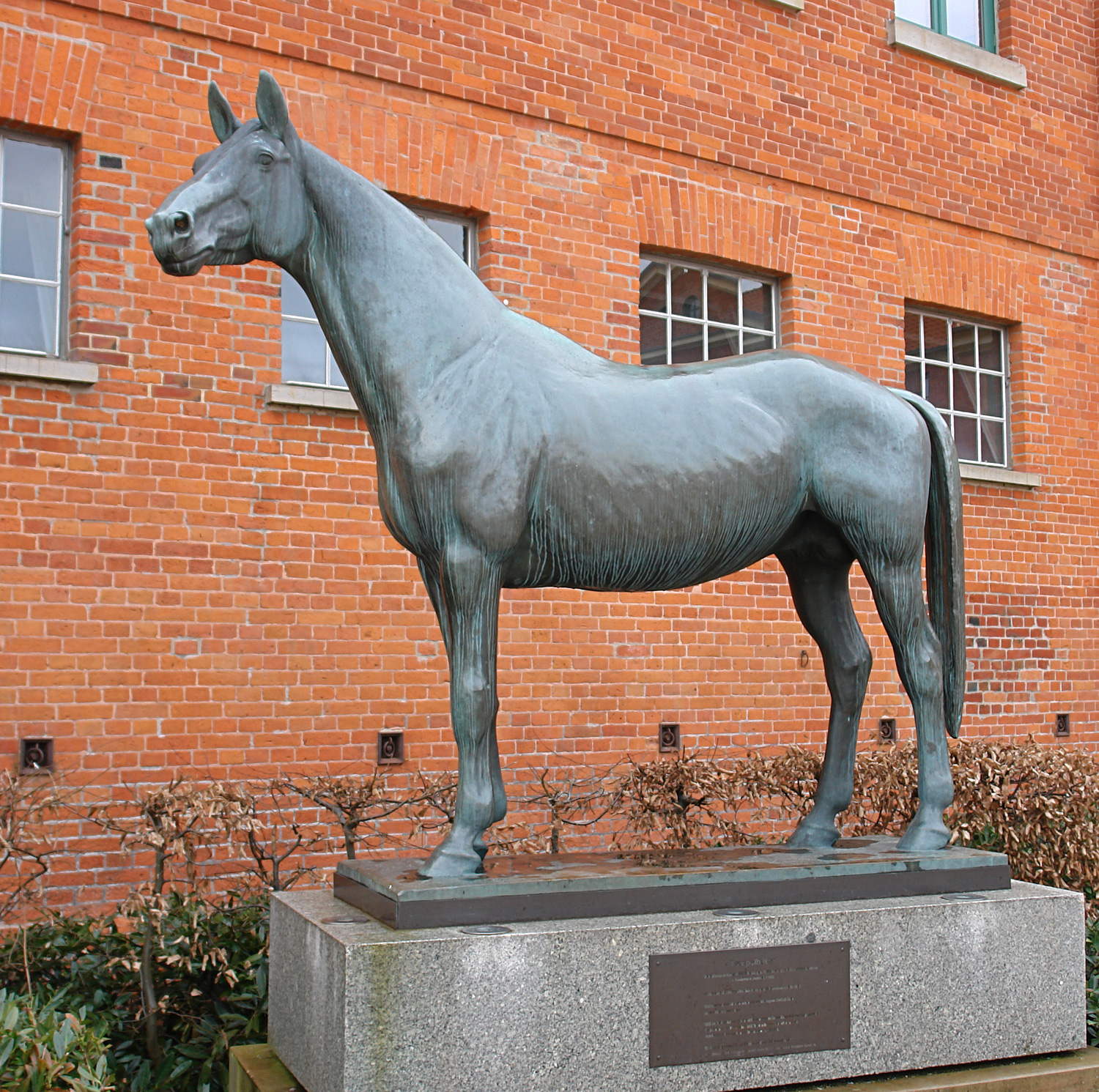 Statue Hengst Tempelhüter (*20. Dezember 1904 in Trakehnen) am Holzmarkt in Verden. Originalabguss aus Moskau (1974). Original 1932 von Prof. Reinhold Kübart in Bronze erstellt.